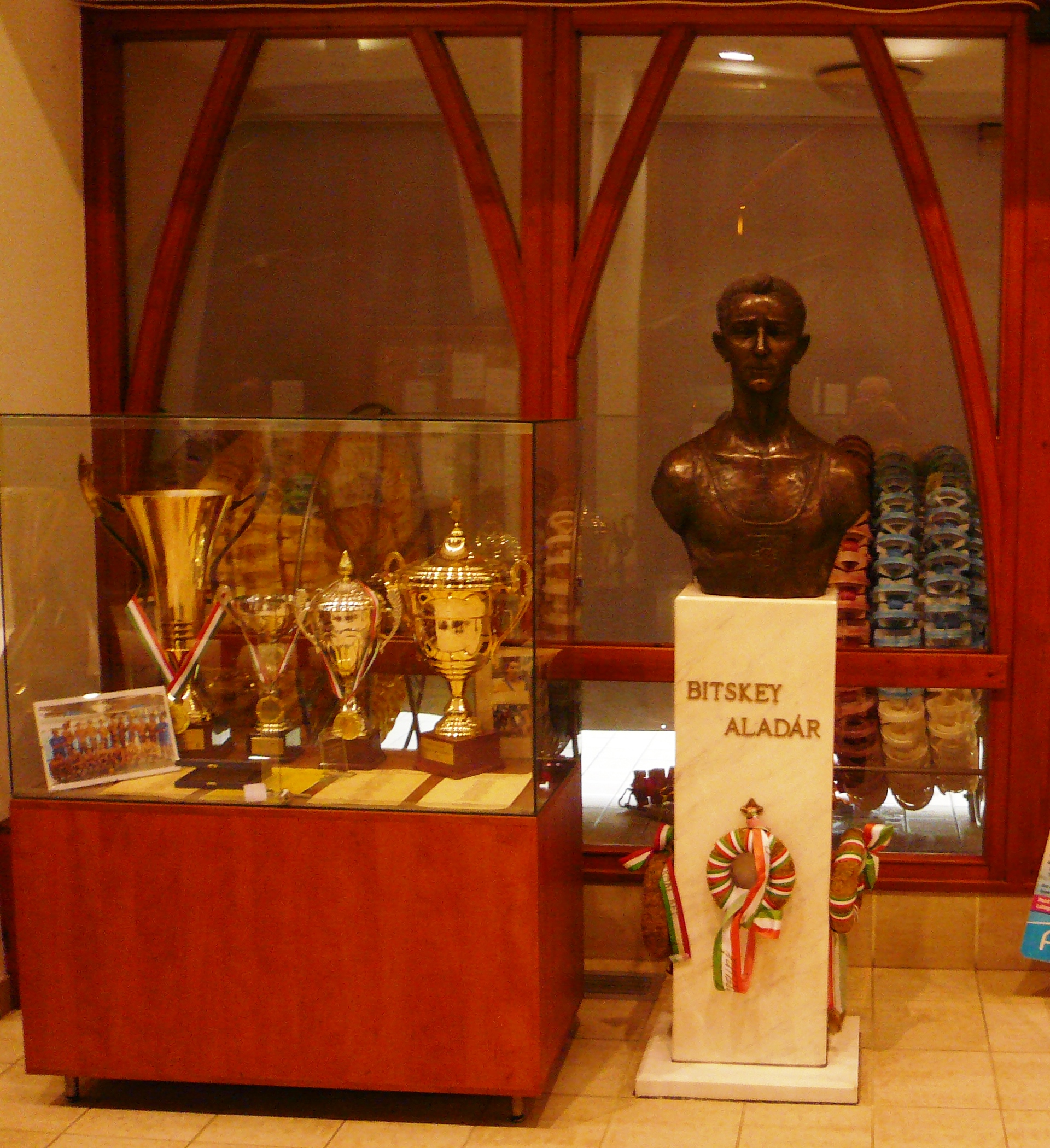 Bitskey Aladár szobra a róla elnevezett uszoda bejáratánál, mellette a serlegekkel.